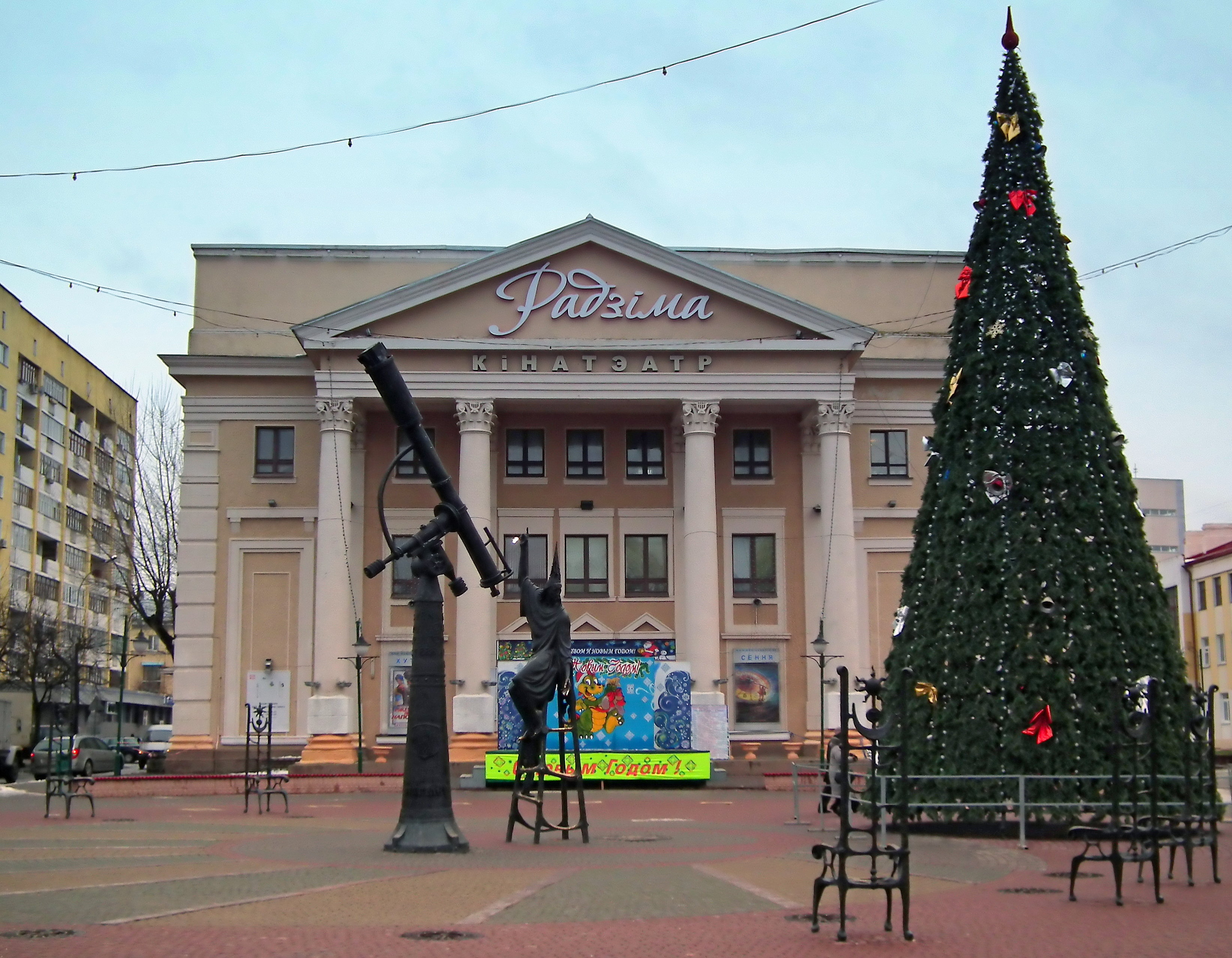 Новый год в Могилёве